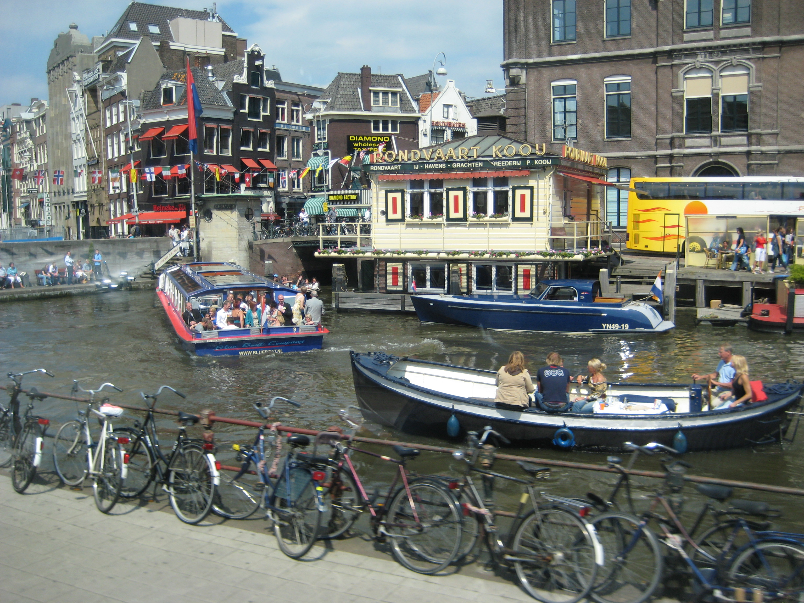 Anert Grachenbild vun Amsterdam